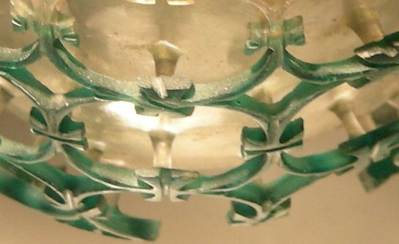 Roman Cage Cup or diatret, a two-layer glass beaker from second half of the 4th century. Found in Cologne, now in the Römisch-Germanisches Museum, Cologne. Photographed by myself.